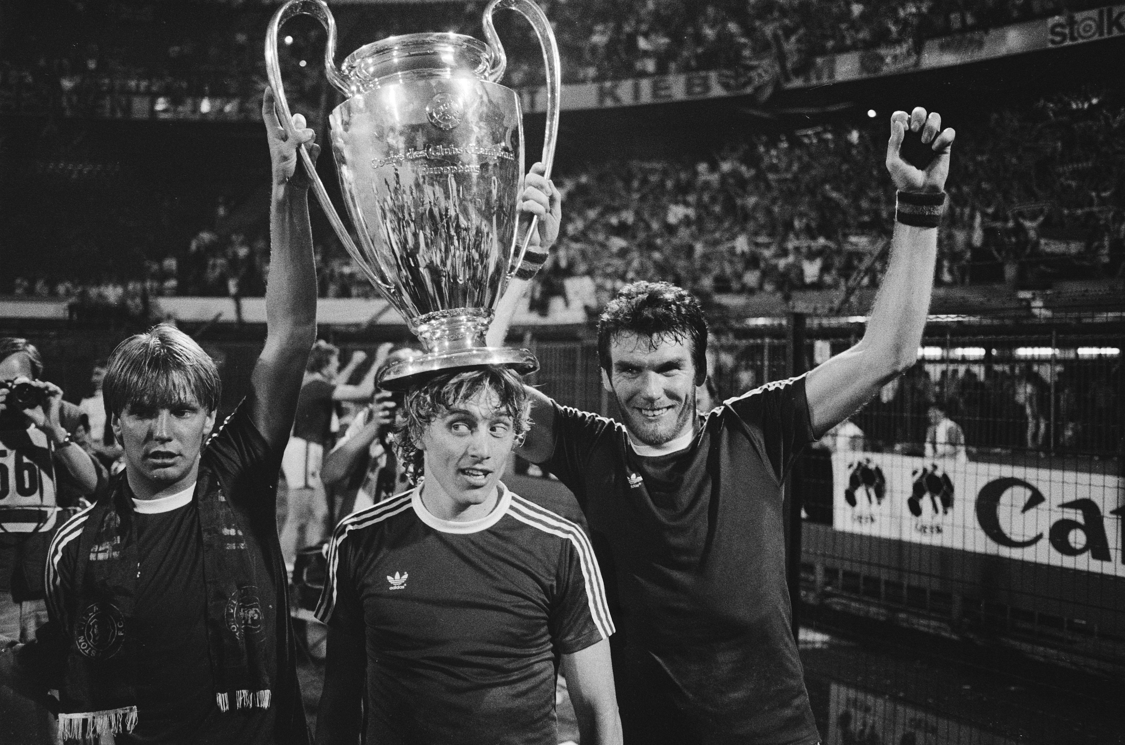 Collectie / Archief : Fotocollectie Anefo Reportage / Serie : [ onbekend ] Beschrijving : FC Bayern Munchen tegen Aston Villa 0-1 Europa Cup I blijde Aston Villa spelers met de Cup Datum : 26 mei 1982 Trefwoorden : sport, voetbal Persoonsnaam : Aston Villa, CUP, FC Bayern Munchen Fotograaf : Antonisse, Marcel / Anefo Auteursrechthebbende : Nationaal Archief Materiaalsoort : Negatief (zwart/wit) Nummer archiefinventaris : bekijk toegang 2.24.01.05 Bestanddeelnummer : 932-1813